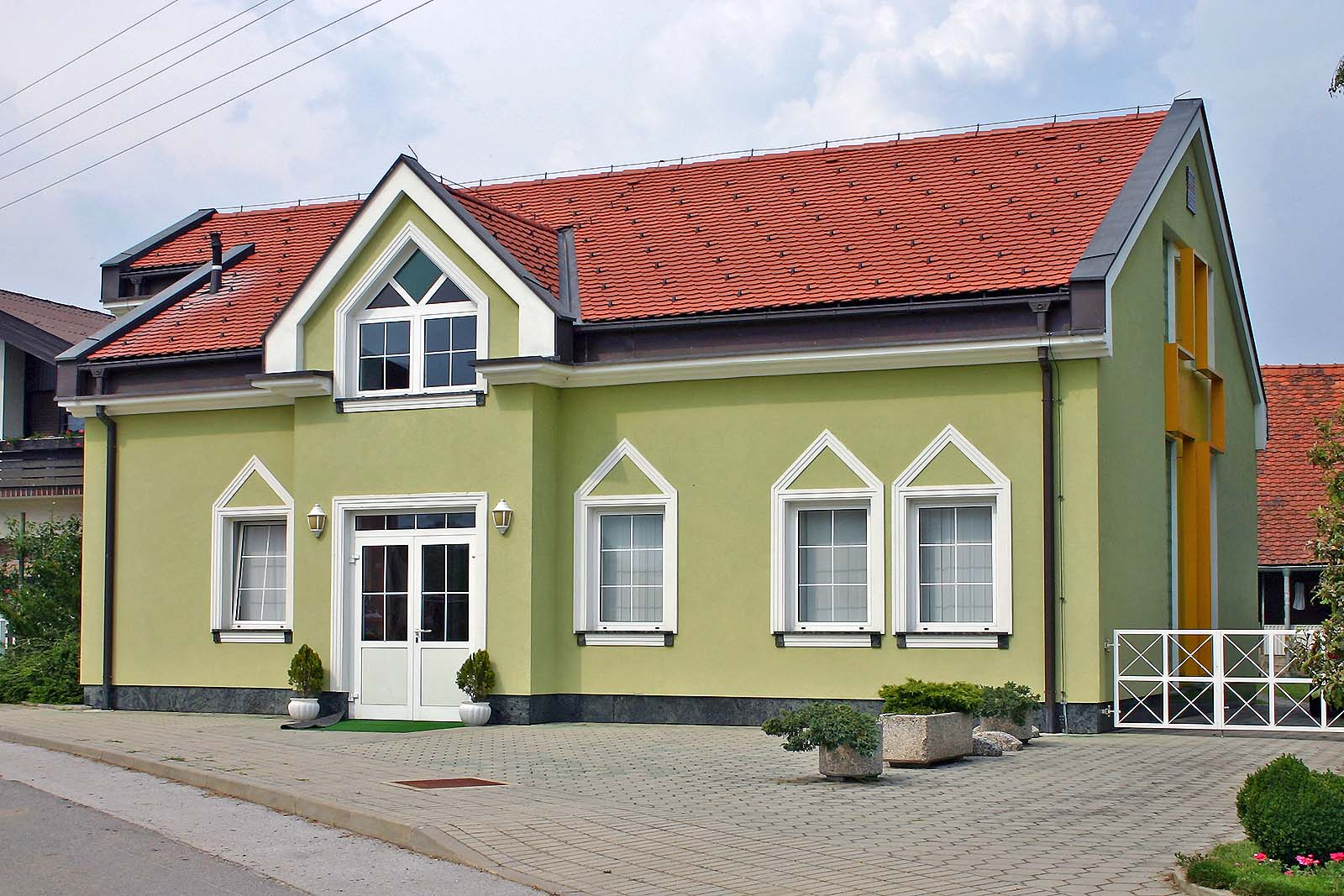 Binkoštna cerkev, Veščica